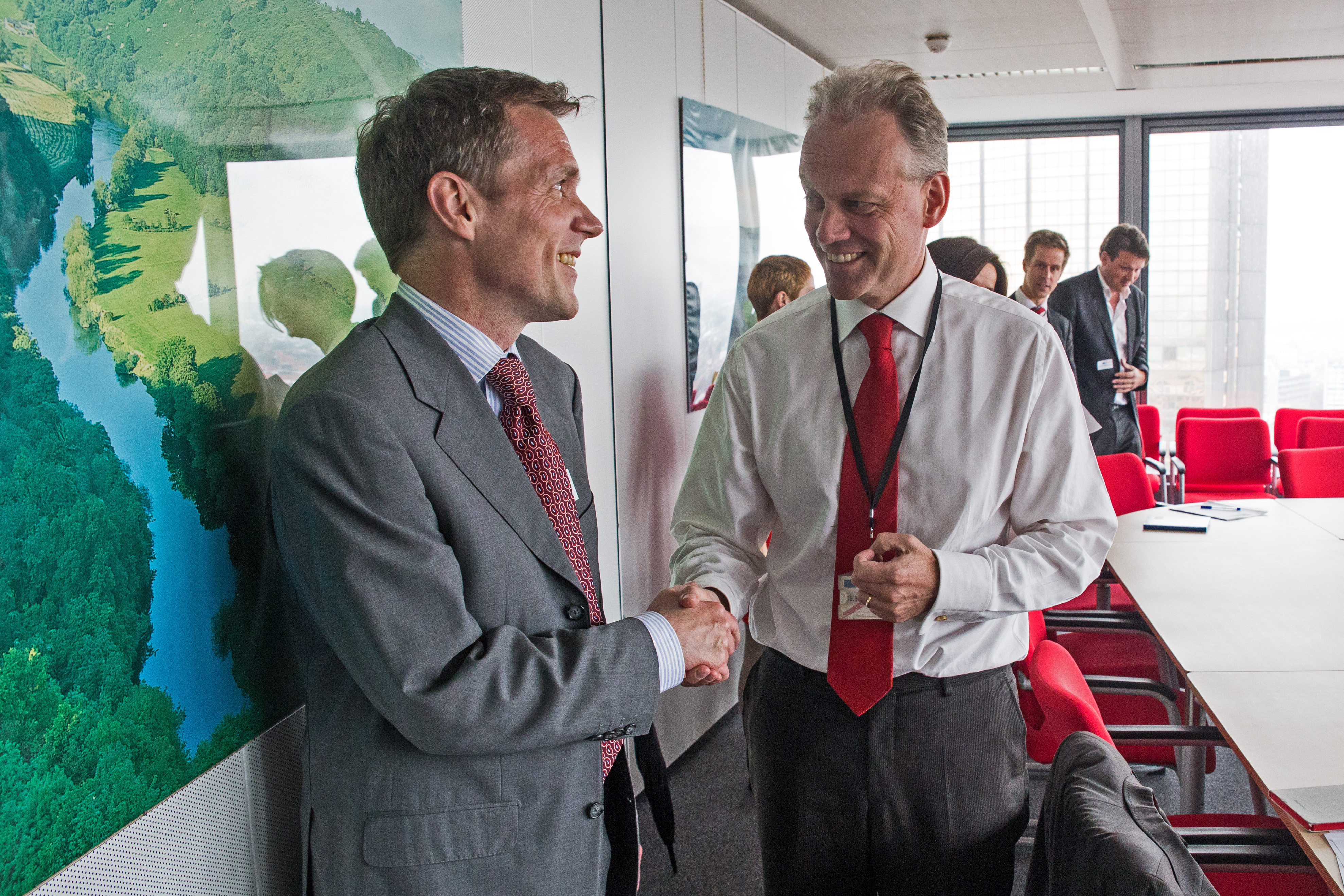 26. mai var statssekretær Paal Bjørnestad i Finansdepartementet i Brussel for å fortsette arbeidet for å få gjennomslag for Norges synspunkter om differensiert arbeidsgiveravgift. Her fra møte med vise-generaldirektør Gert-Jan Koopman i Europakommisjonens generaldirektorat for konkurranse. Les mer om formålet med statssekretærens møte her: Foto: Stian Mathisen, EU-delegasjonen